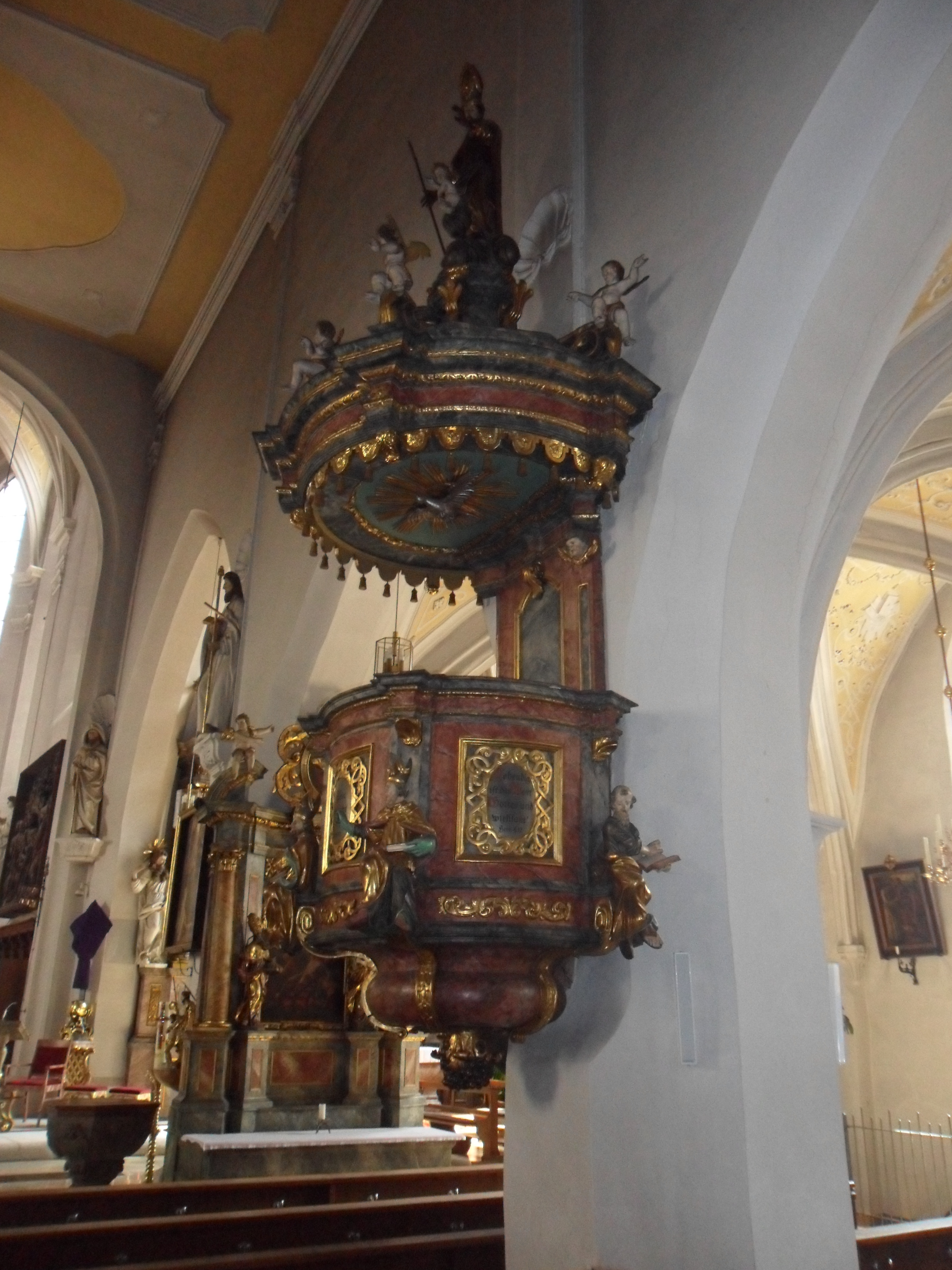 St. Martinskirche Forchheim April 2011 13